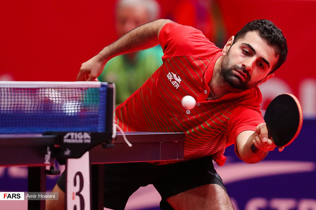 نوشاد عالمیان در رقابت‌های تنیس روی میز بازیهای آسیایی جاکارتا ۲۰۱۸ اندونزی